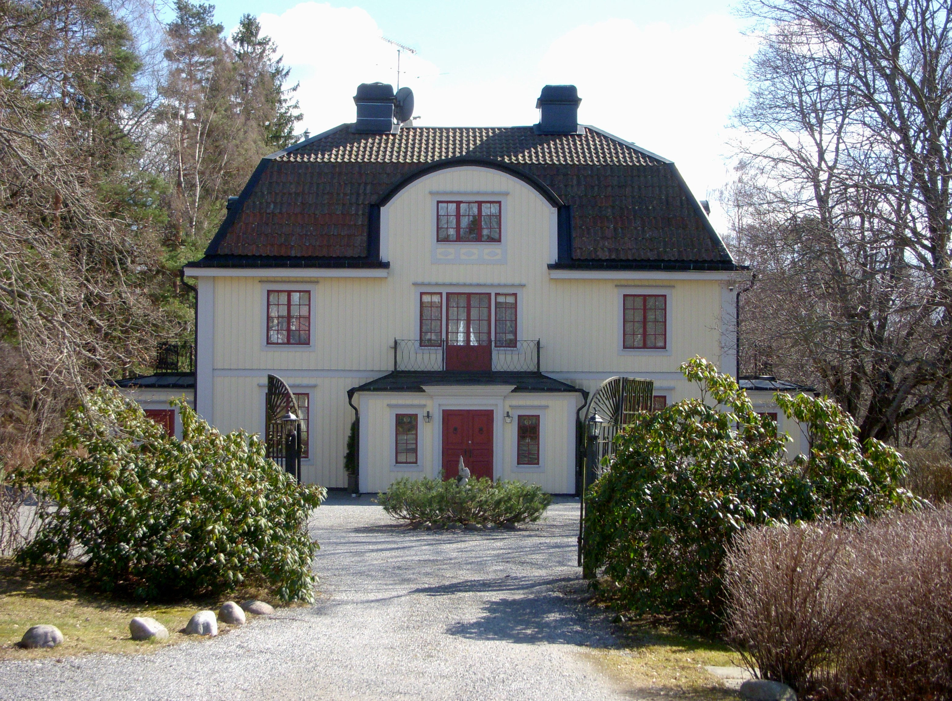 Mörtviks gård från norr